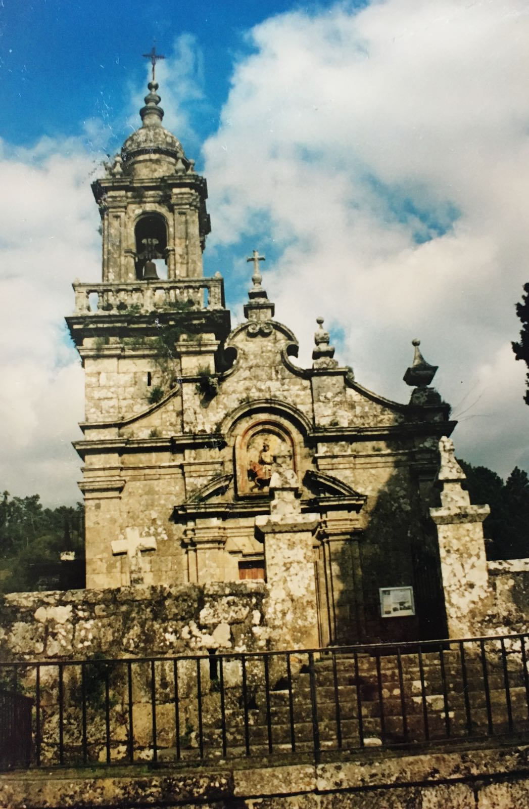 Igrexa de San Martiño de Valongo, no concello de Cortegada